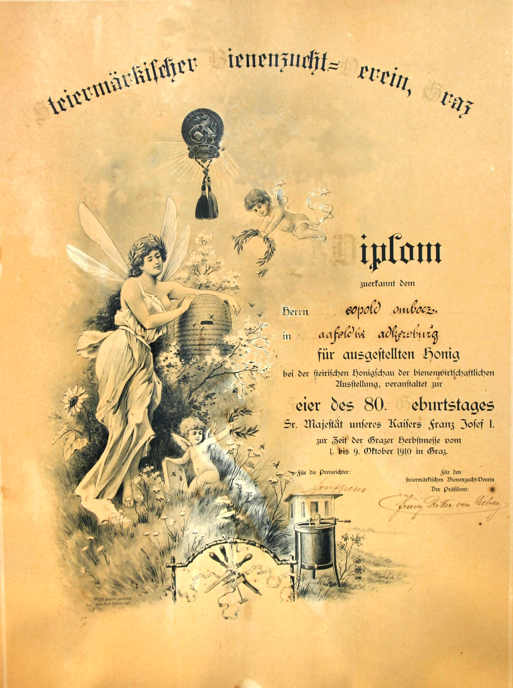 Diplom, mit dem der österreichisch-ungarische Imker Leopold Gombocz (1875–1943) aus Laafeld bei Radkersburg (Steiermark) bei der Steirischen Honigschau, die 1910 im Rahmen einer bienenwirtschaftlichen Ausstellung zur Feier des 80. Geburtstages des Kaisers Franz Joseph I. zur Zeit der Grazer Herbstmesse veranstaltet wurde, vom Steiermärkischen Bienenzucht-Verein für den von ihm ausgestellten Honig (für besondere Qualität) ausgezeichnet wurde.